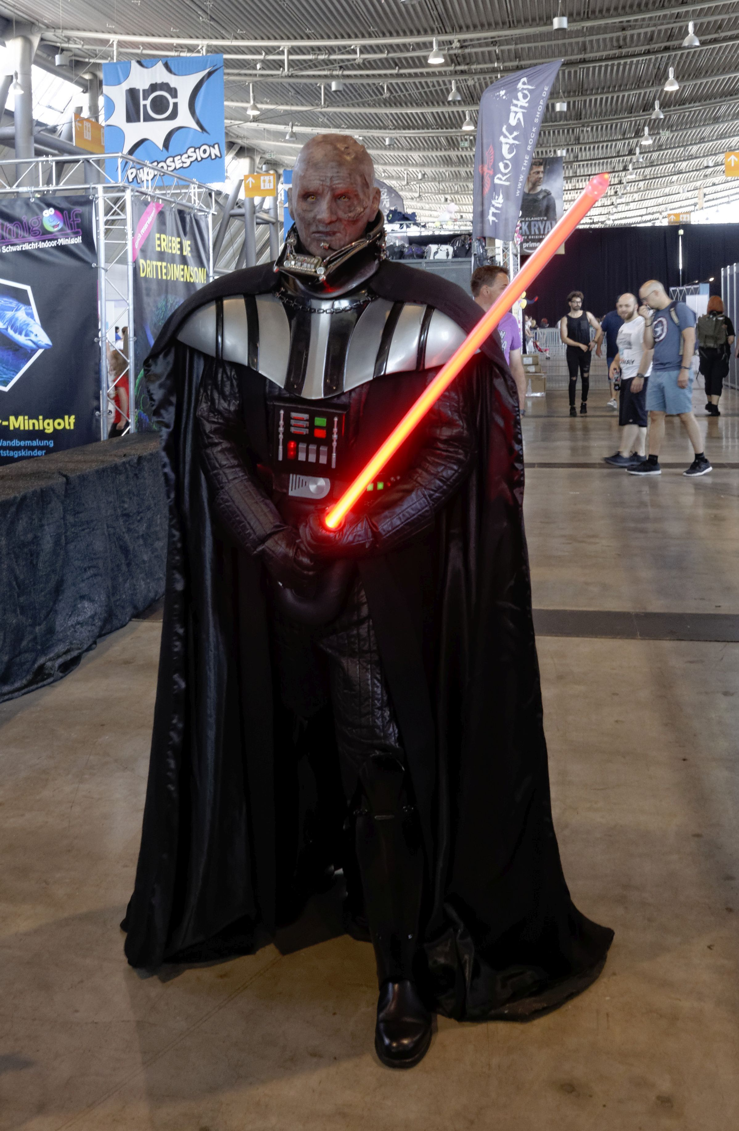 Bilder von der Comic Con Germany in Stuttgart 2018